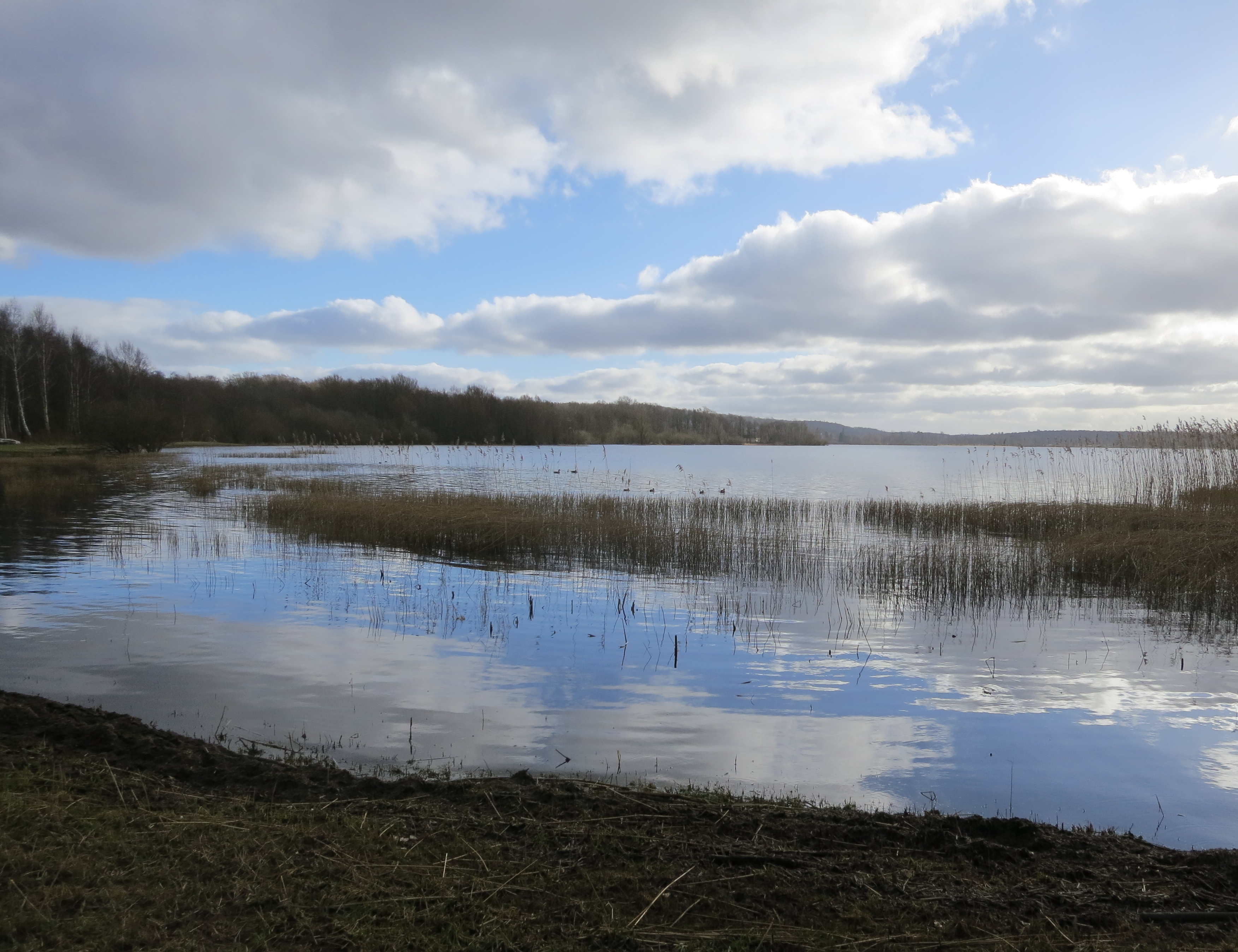 Finjasjön i februari 2015